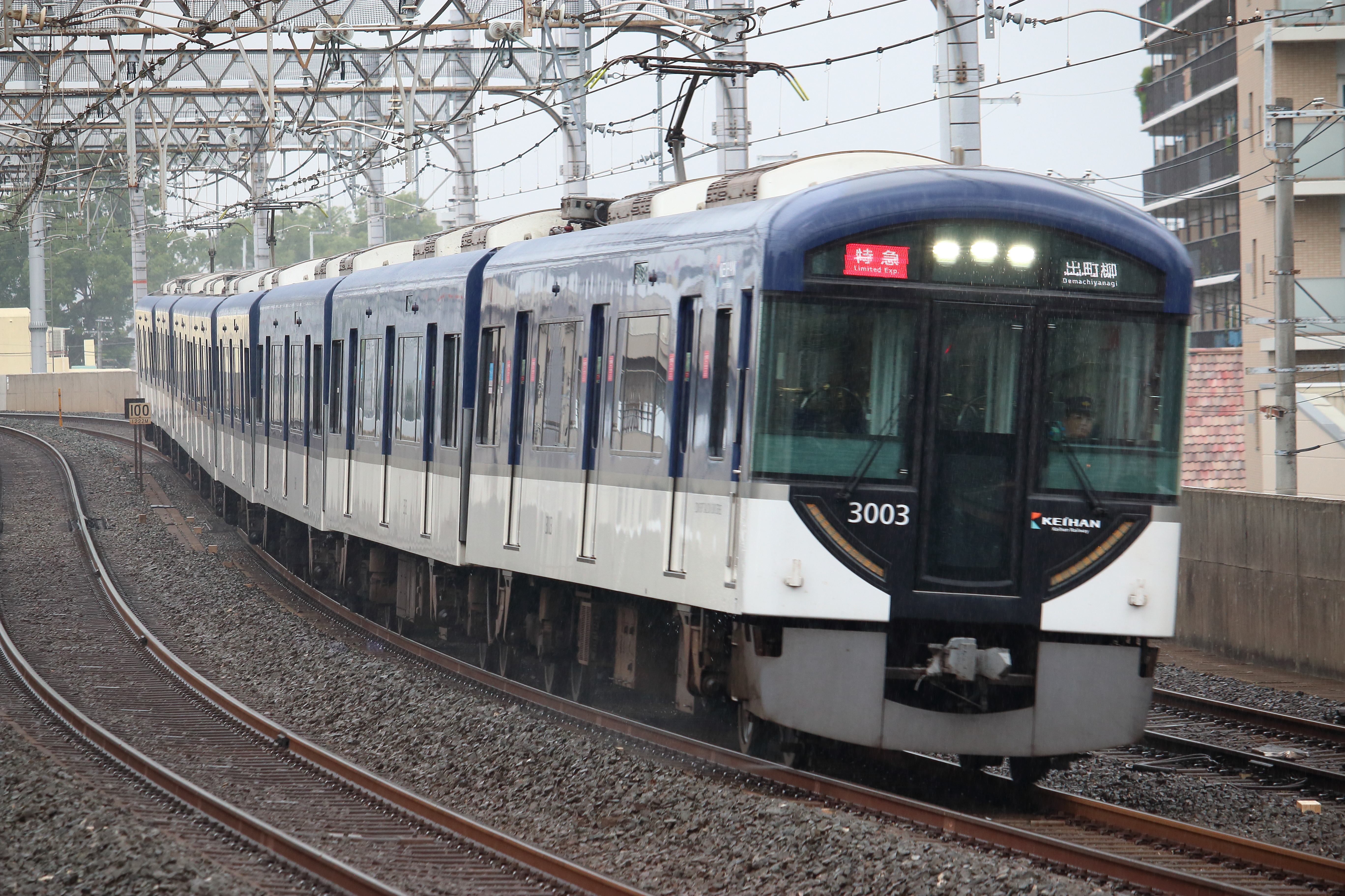 京阪3000系 正面変更車 大和田駅